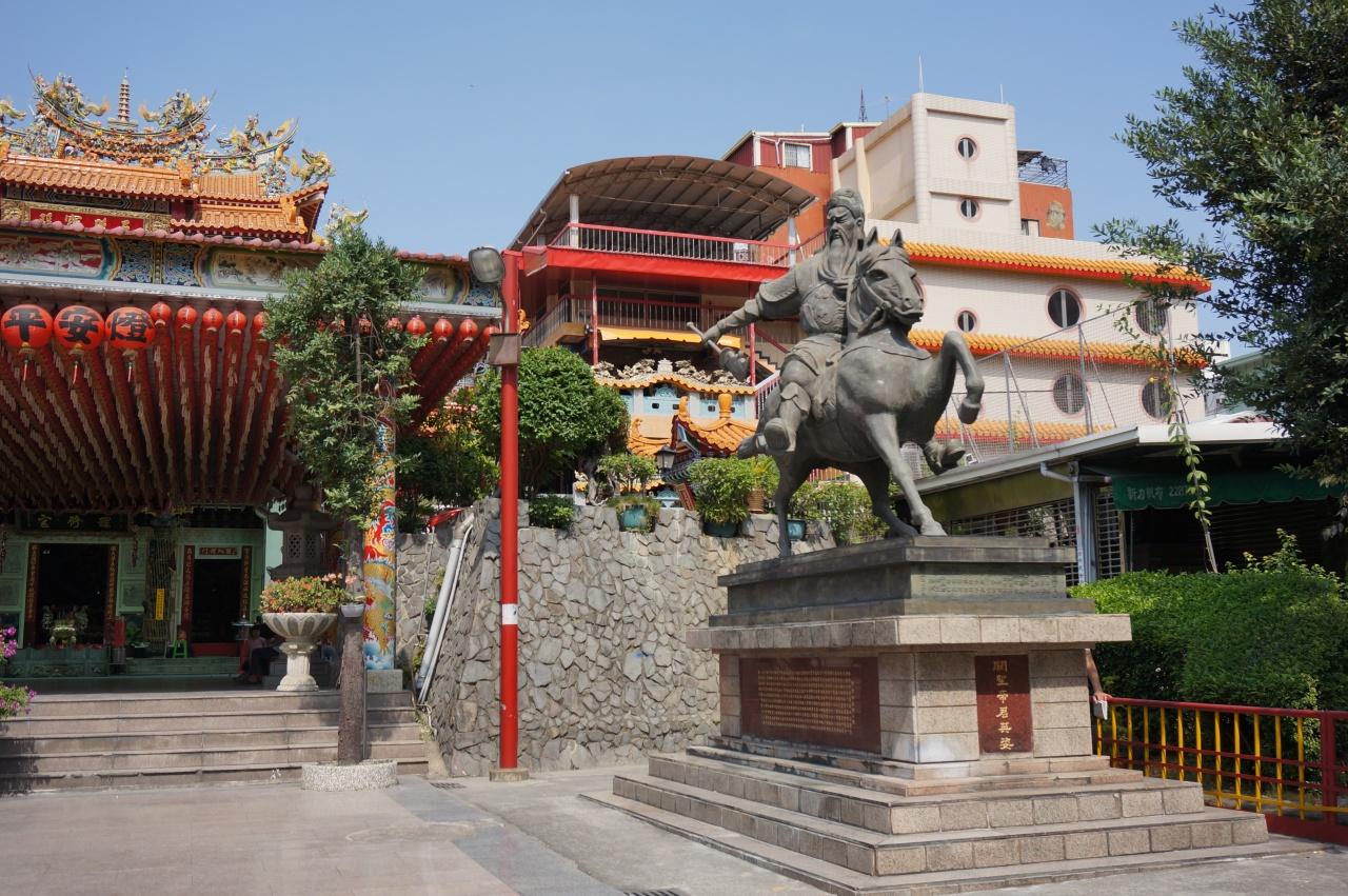 臺中市南區醒修宮前的「關聖帝君英姿」石像。